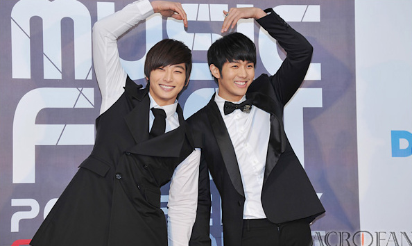 2AM. 2011년 2월, MTV-DAUM 뮤직 페스트에서.